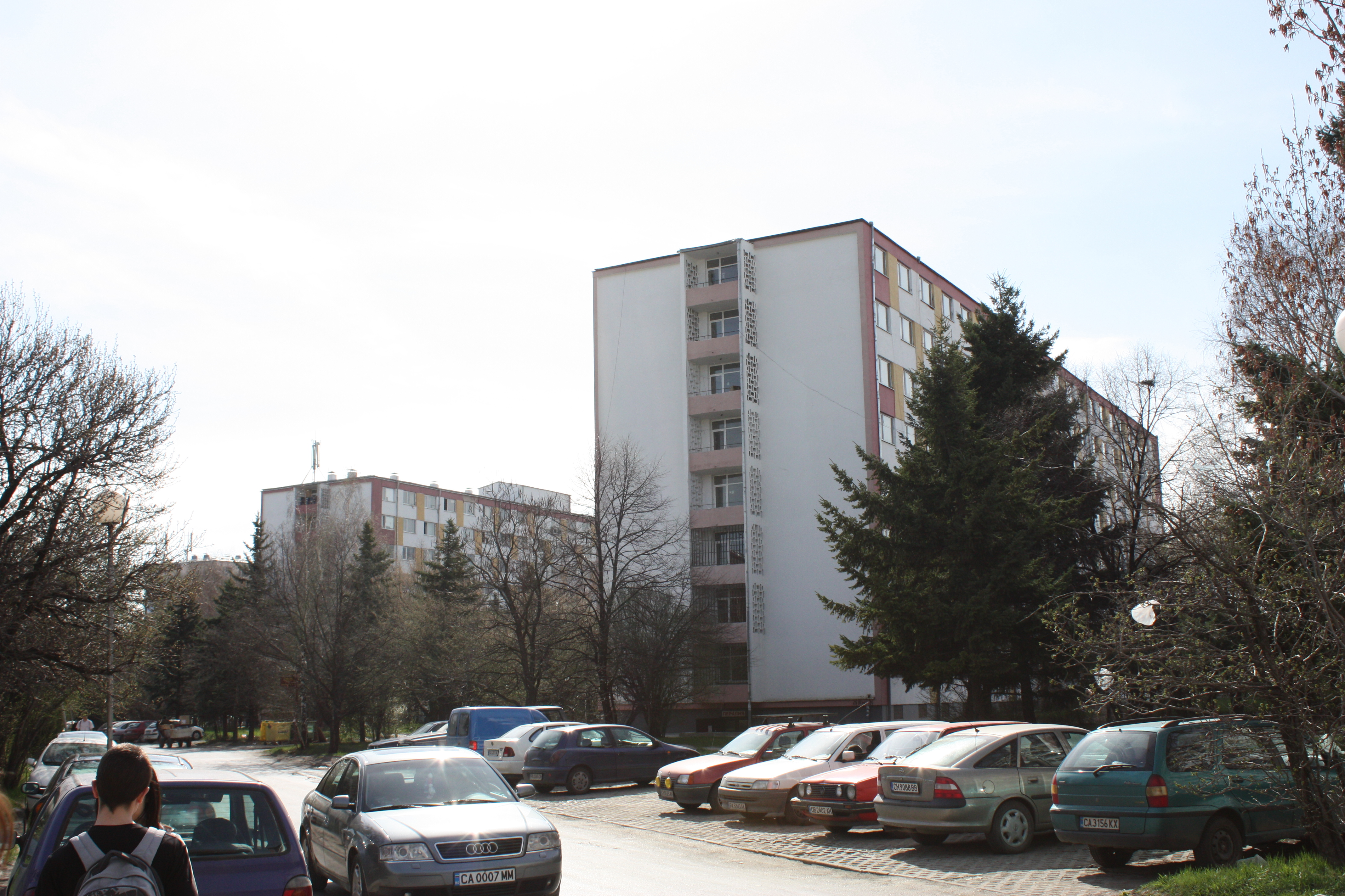 Studentski grad, Studentenstädtchen, Student quarter, Sofia, Bulgaria; Block 1, Block 2, Block 3, Block 4